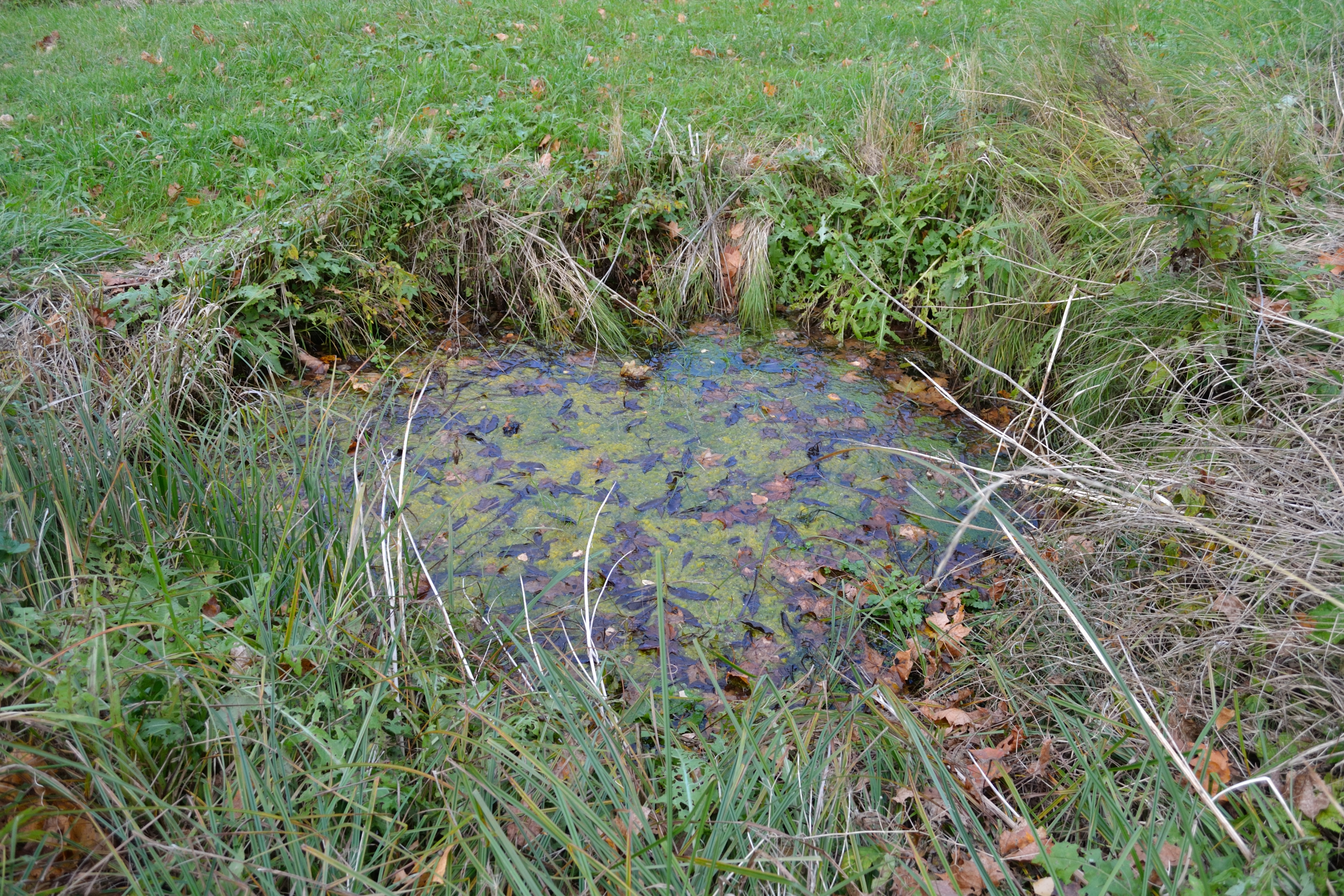 Ohvriallikas, Kernu vald, Laitse küla Rehe